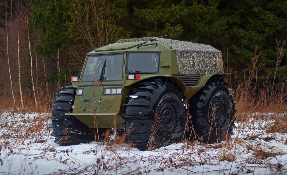 Снегоболотоход 'Шерп' в болотистой местности